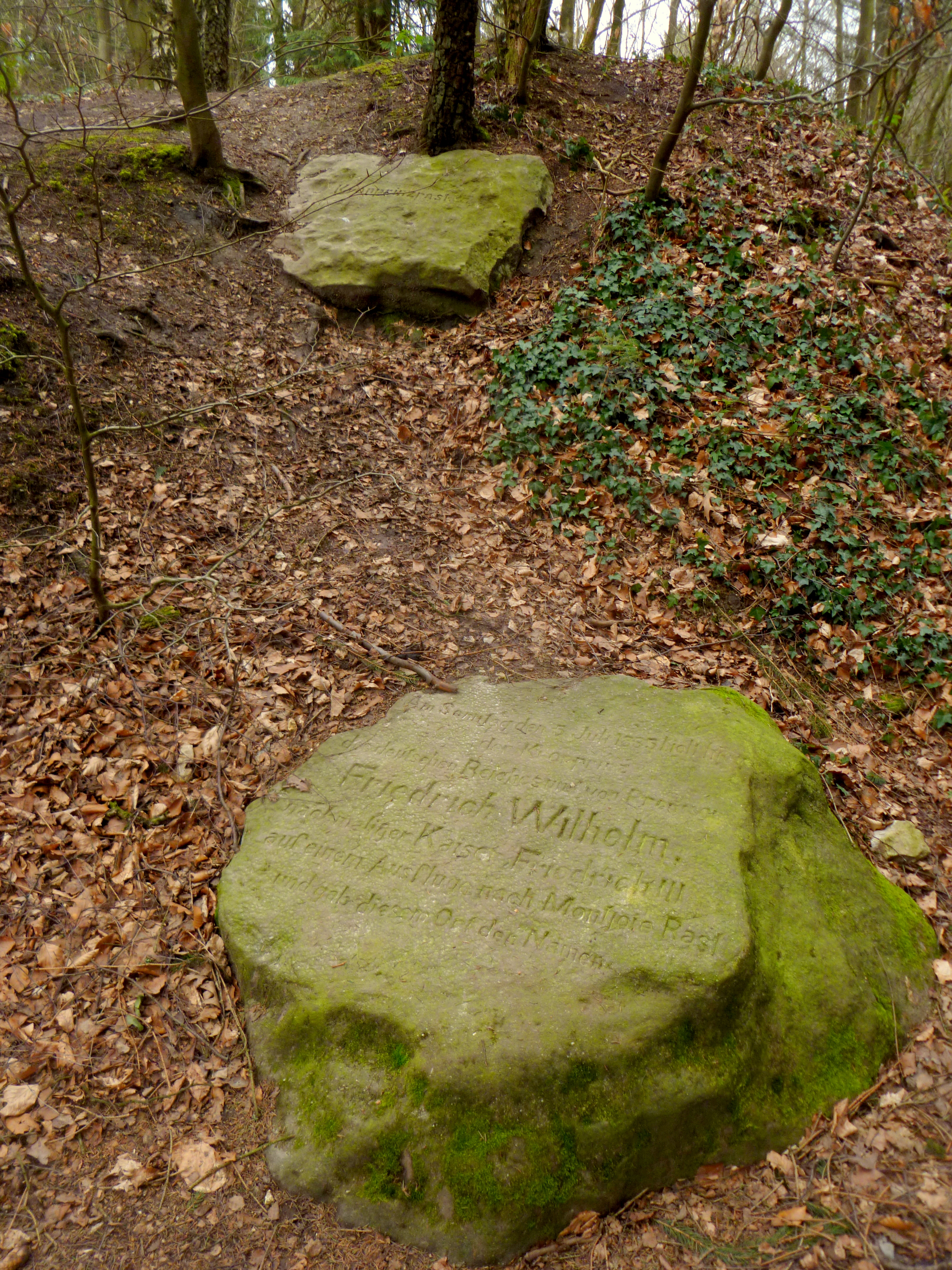 Gedenkstein auf Kronprinzenrast im Aachener Wald, der an den Besuch des Kronprinzen Friedrich Wilhelm erinnert, welcher 1883 hier auf der Durchreise verweilte.